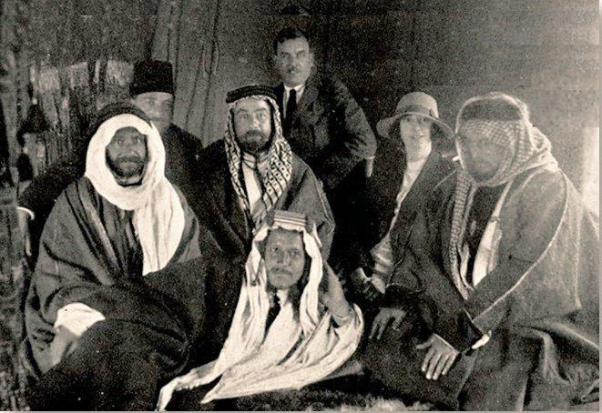 الأمير النوري الشعلان، والملك عبدالله ملك الأردن، وتحت الشريف علي الحارثي